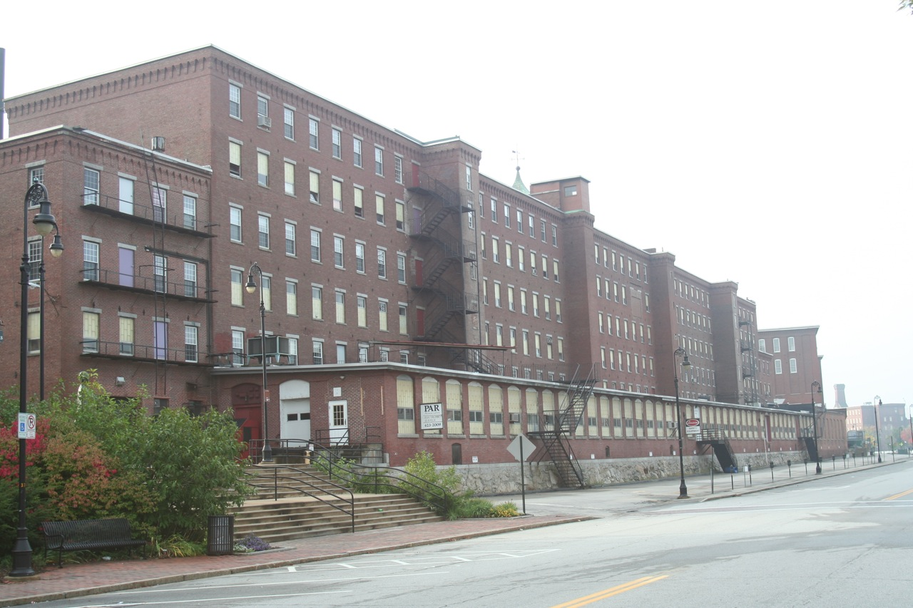 Textilfabrik in Manchester (New Hampshire)